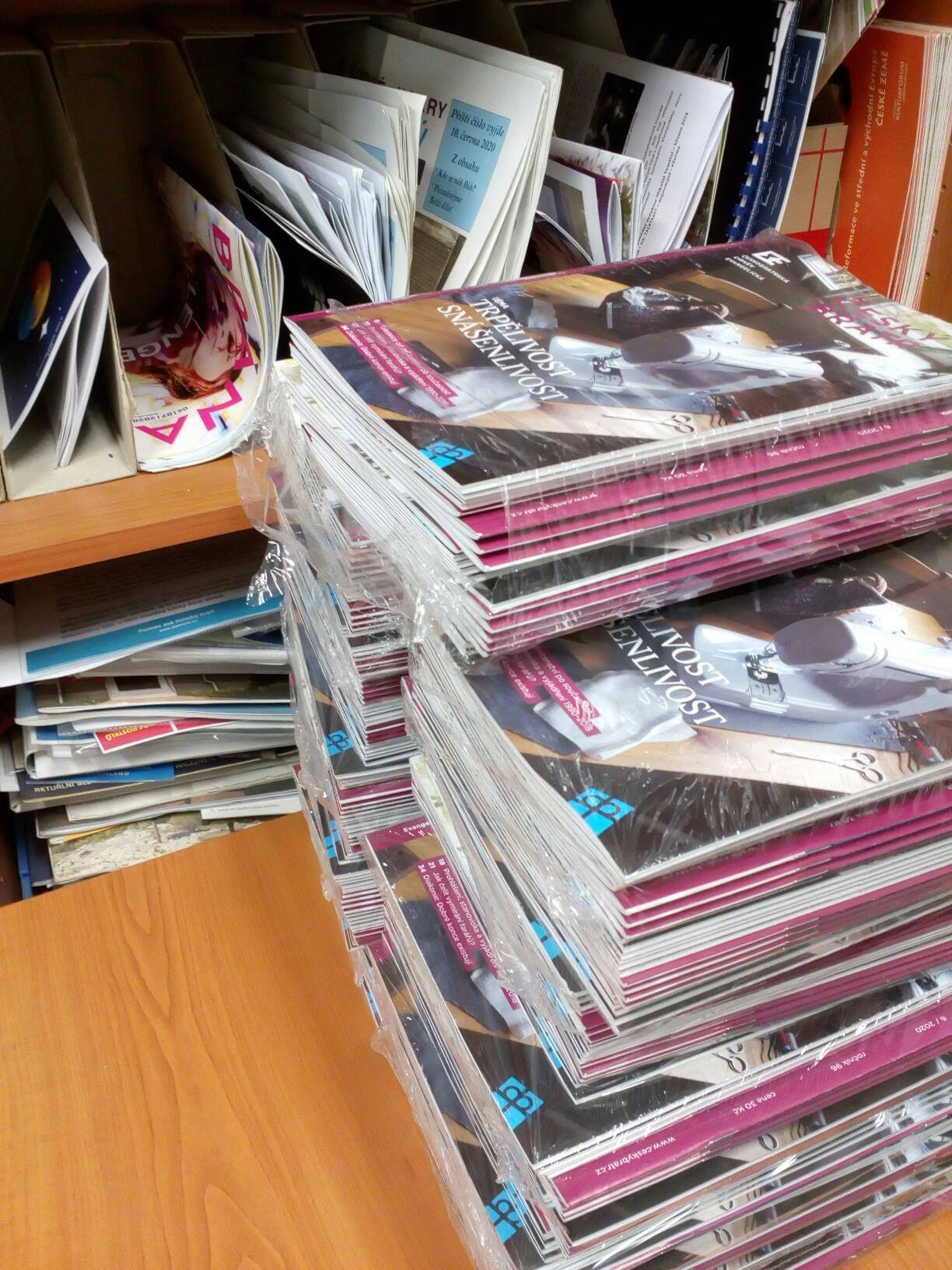 nové vydání Českého bratra 6/2020